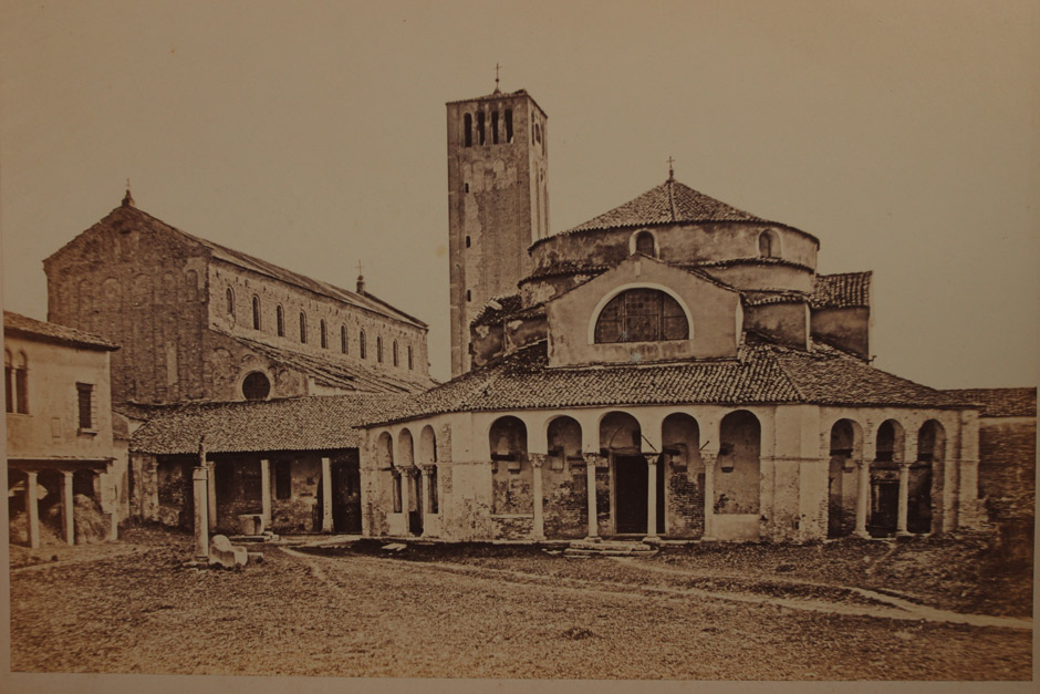 Santa Fosca and the Duomo, Torcello, 1850s